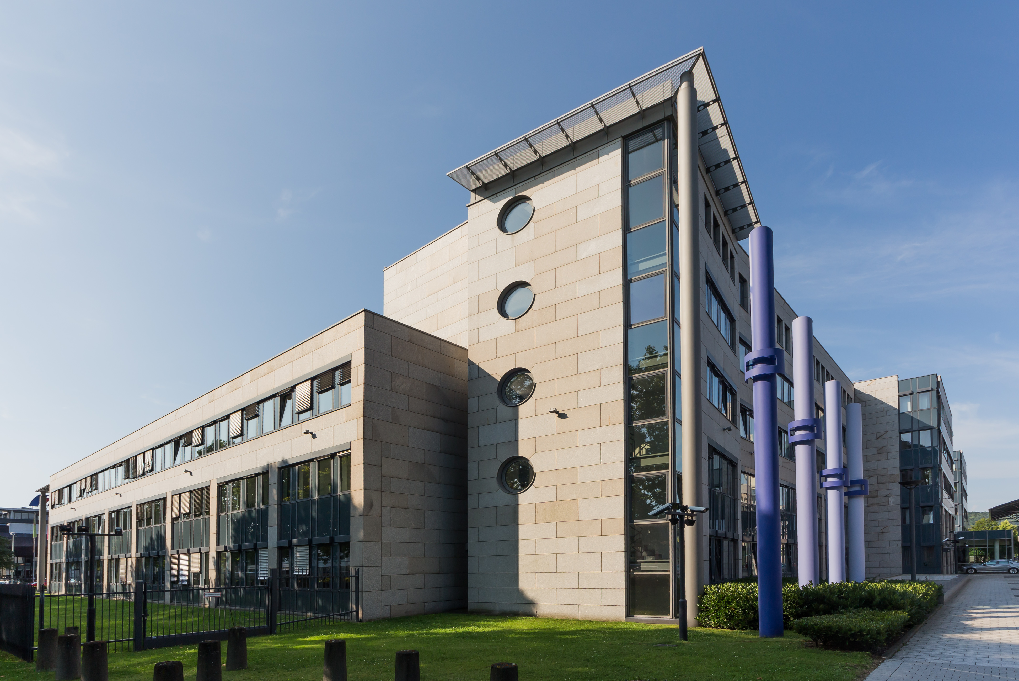 Friedrich-Ebert-Allee 40, Bonn-Gronau – Sitz der Deutschen Gesellschaft für Internationale Zusammenarbeit (GIZ)